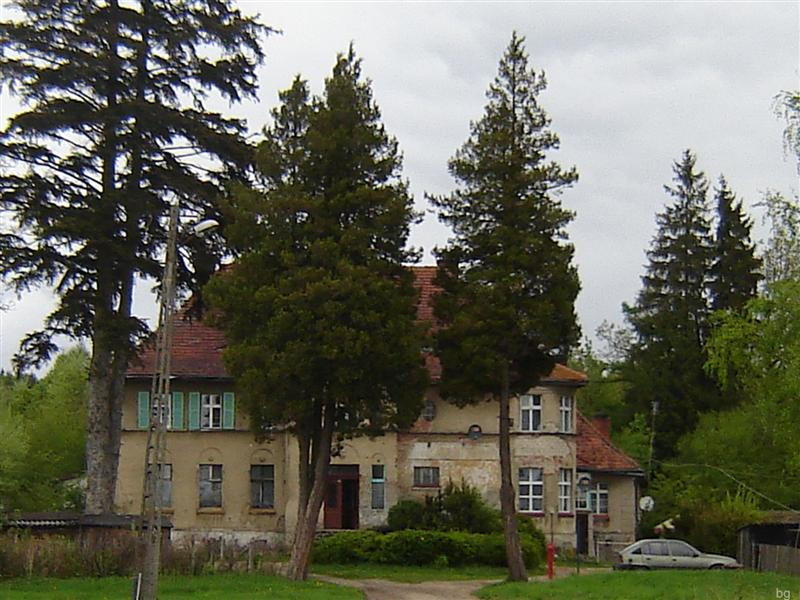 Pałac.